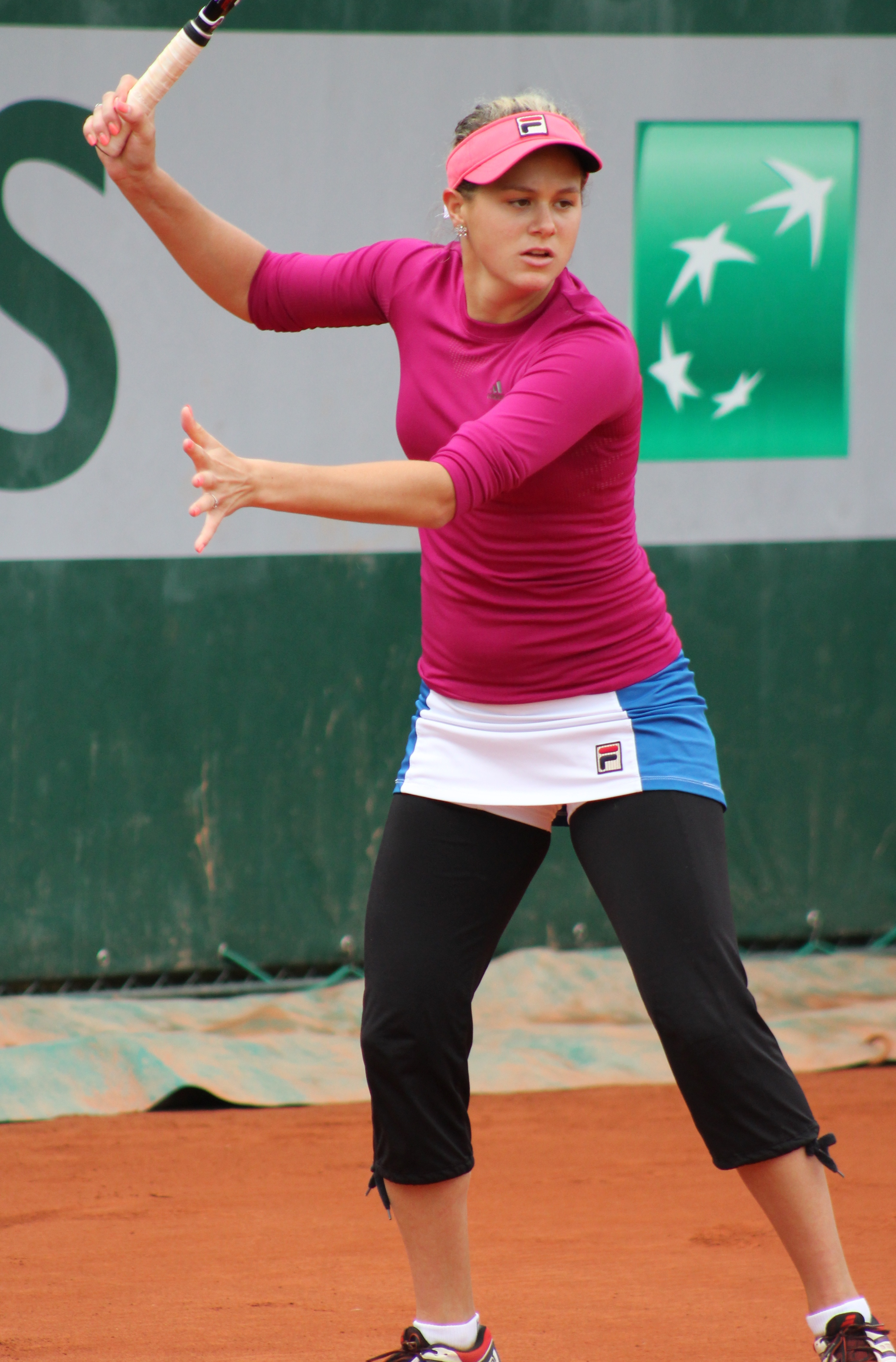 Cepelova RG13 (5)